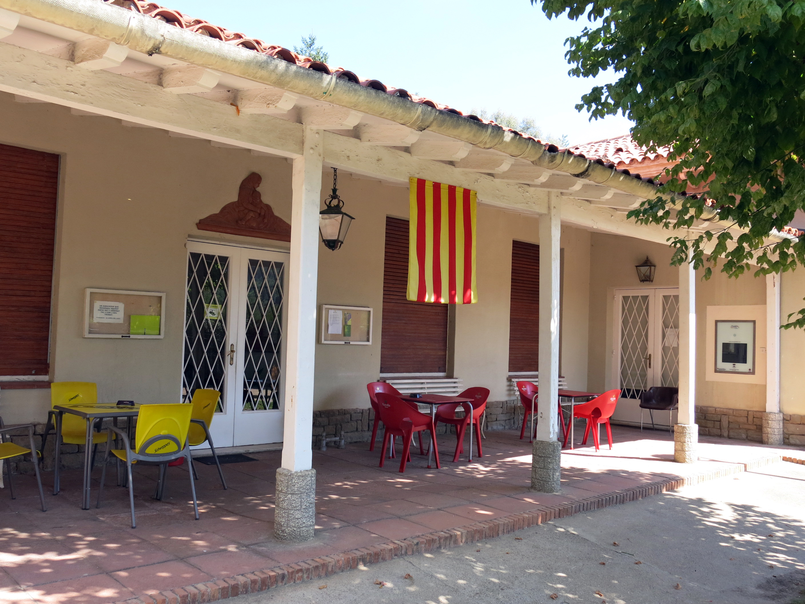 Colònia industrial de Borgonyà (Sant Vicenç de Torelló)